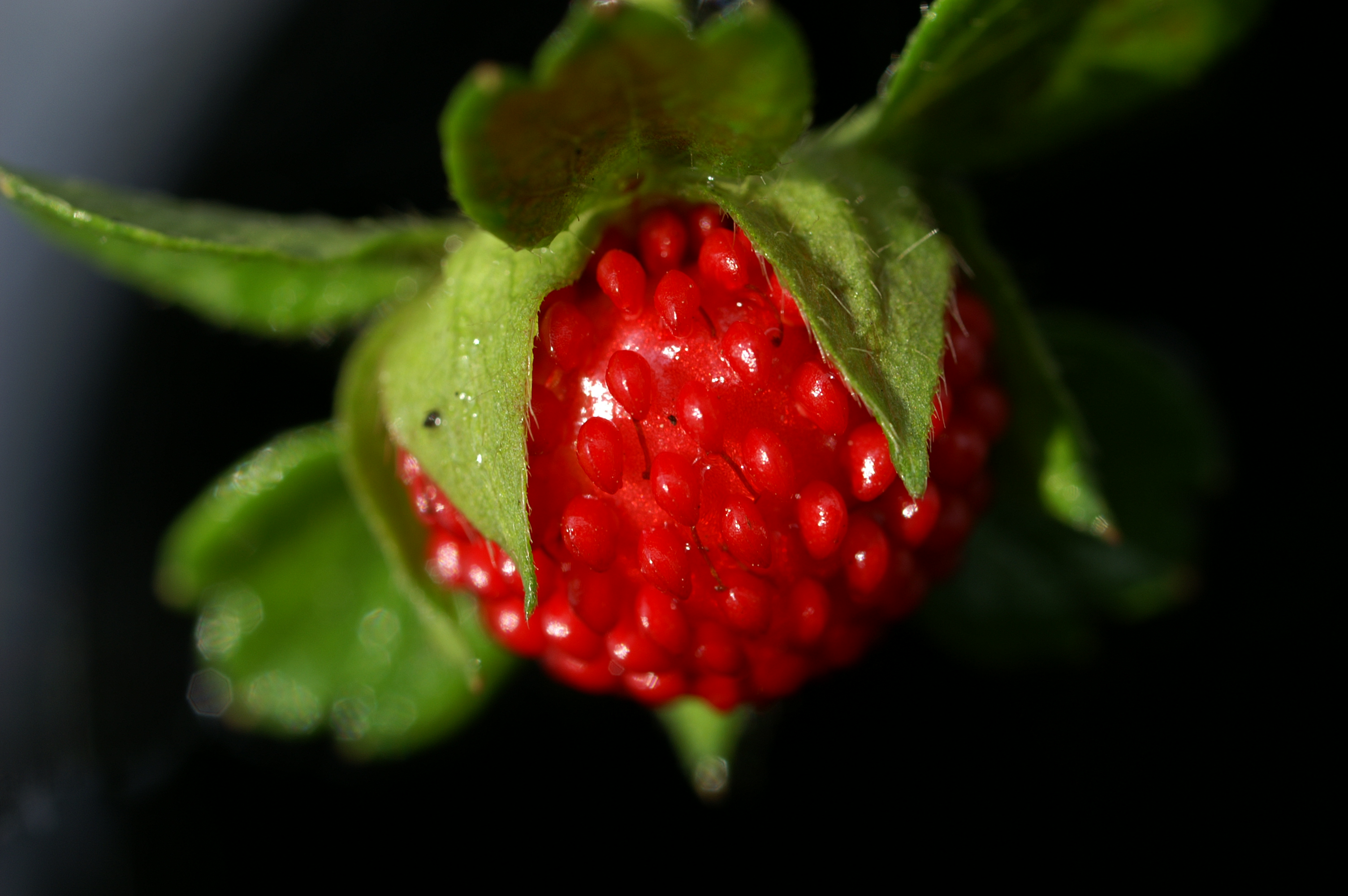 Scheinerdbeere oder Trugerdbeere